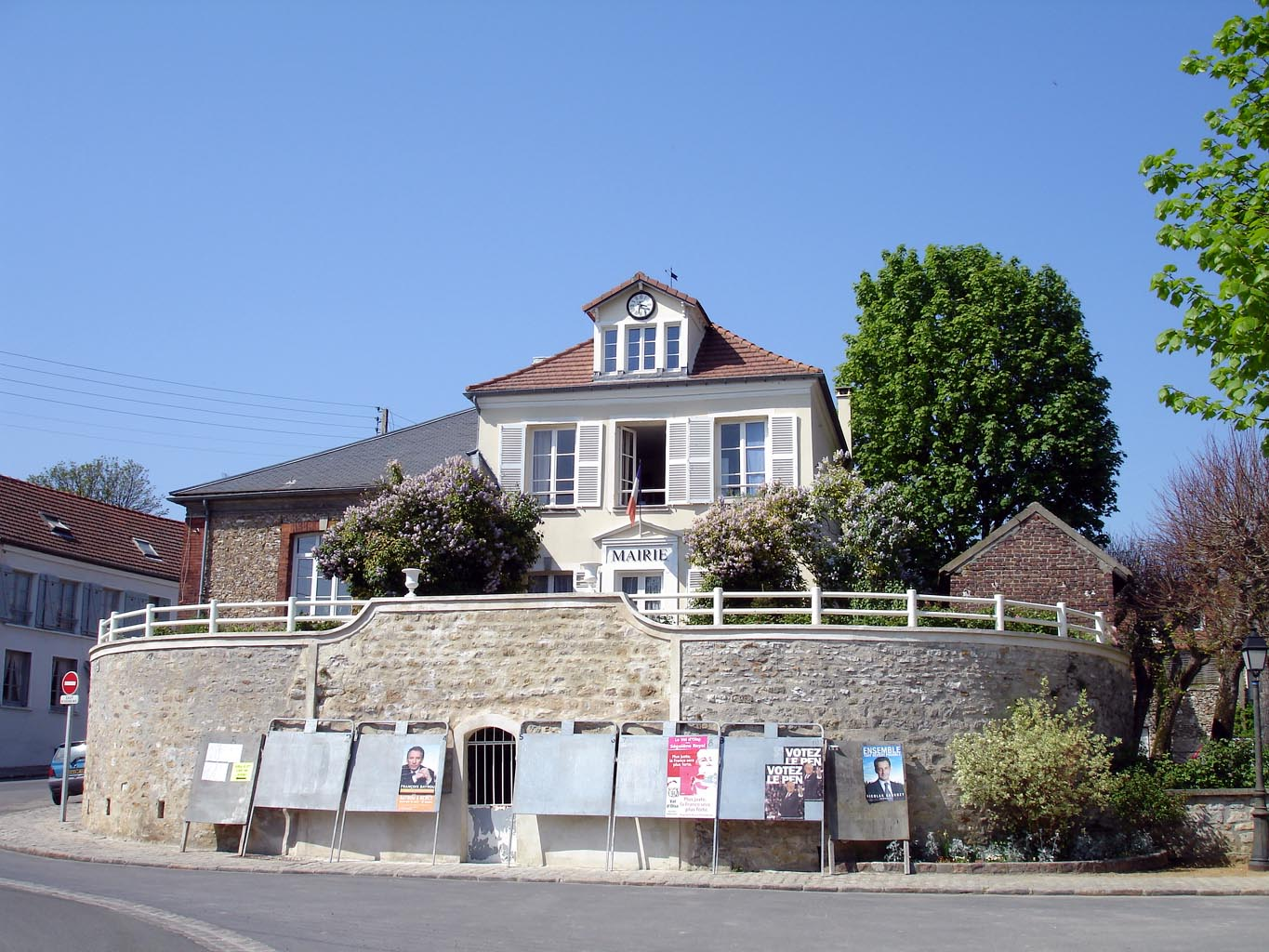 Mairie de Mareil-en-France (Val-d'Oise), France